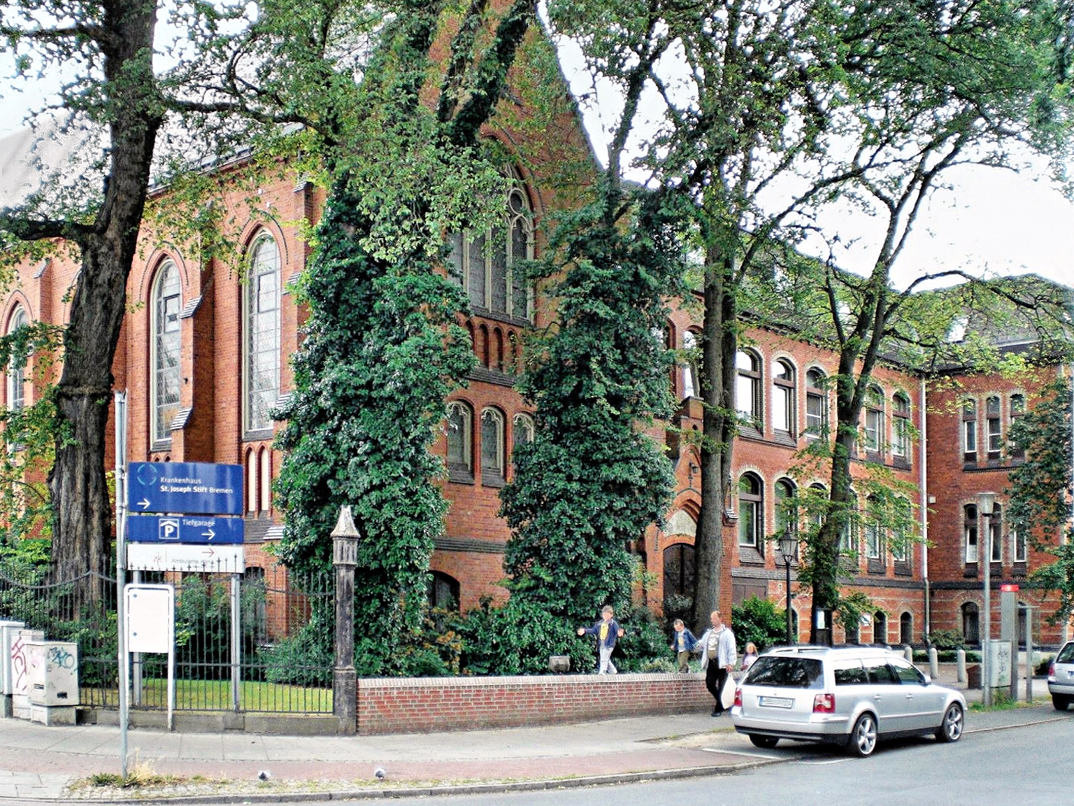 Teilansicht des Gebäudekomplexes des Krankenhauseses St.-Joseph-Stift Bremen in Bremen-Schwachhausen. Blickrichtung von der Schwachhauser Heerstraße in die Schubertstraße. Links, als Eckbau des Altbauteils zur Schwachhauser Heerstraße, die Kapelle.